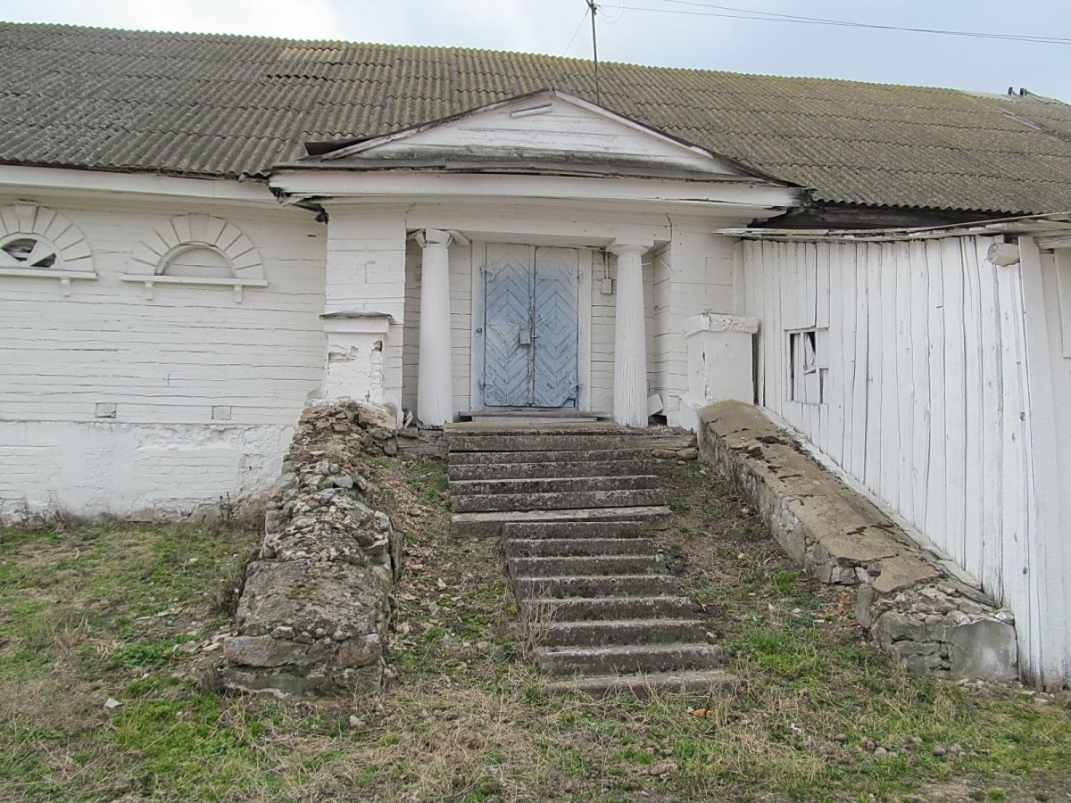 Радзівілімонты. Свіран